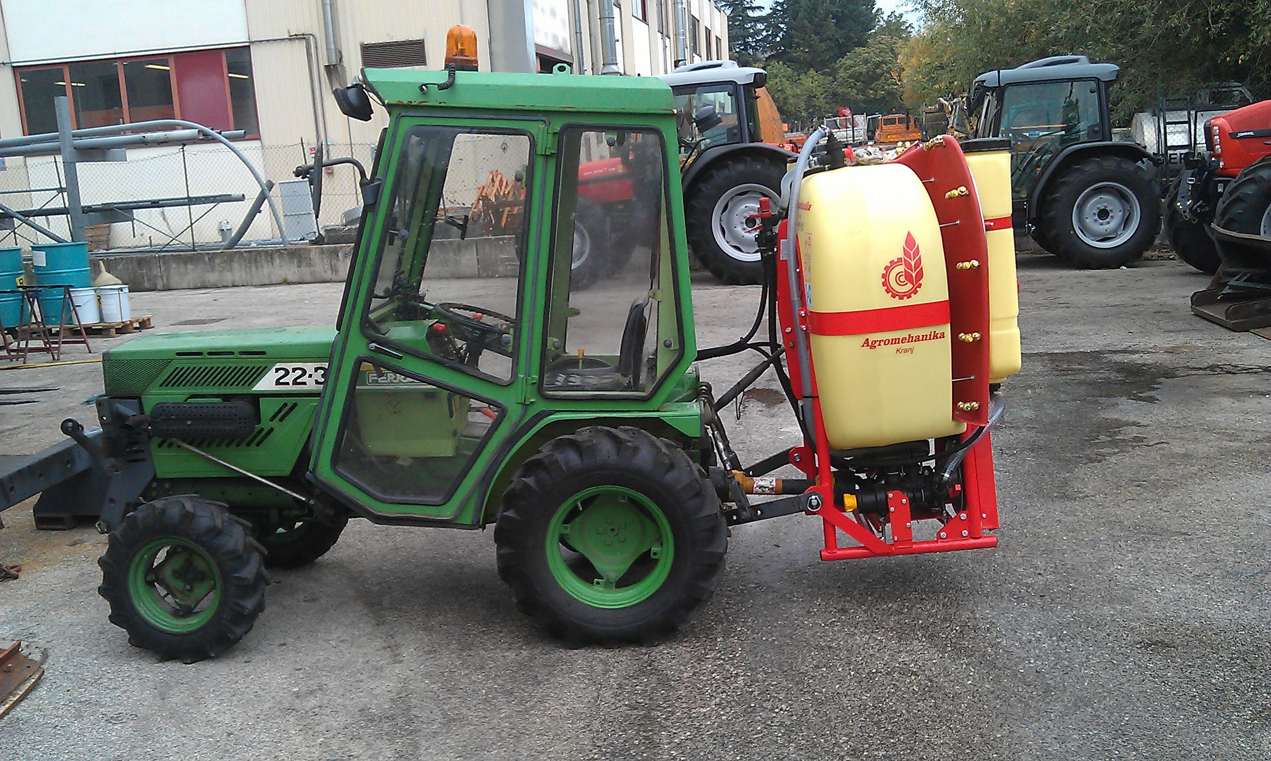 atomizzatore agricolo di piccole dimensioni